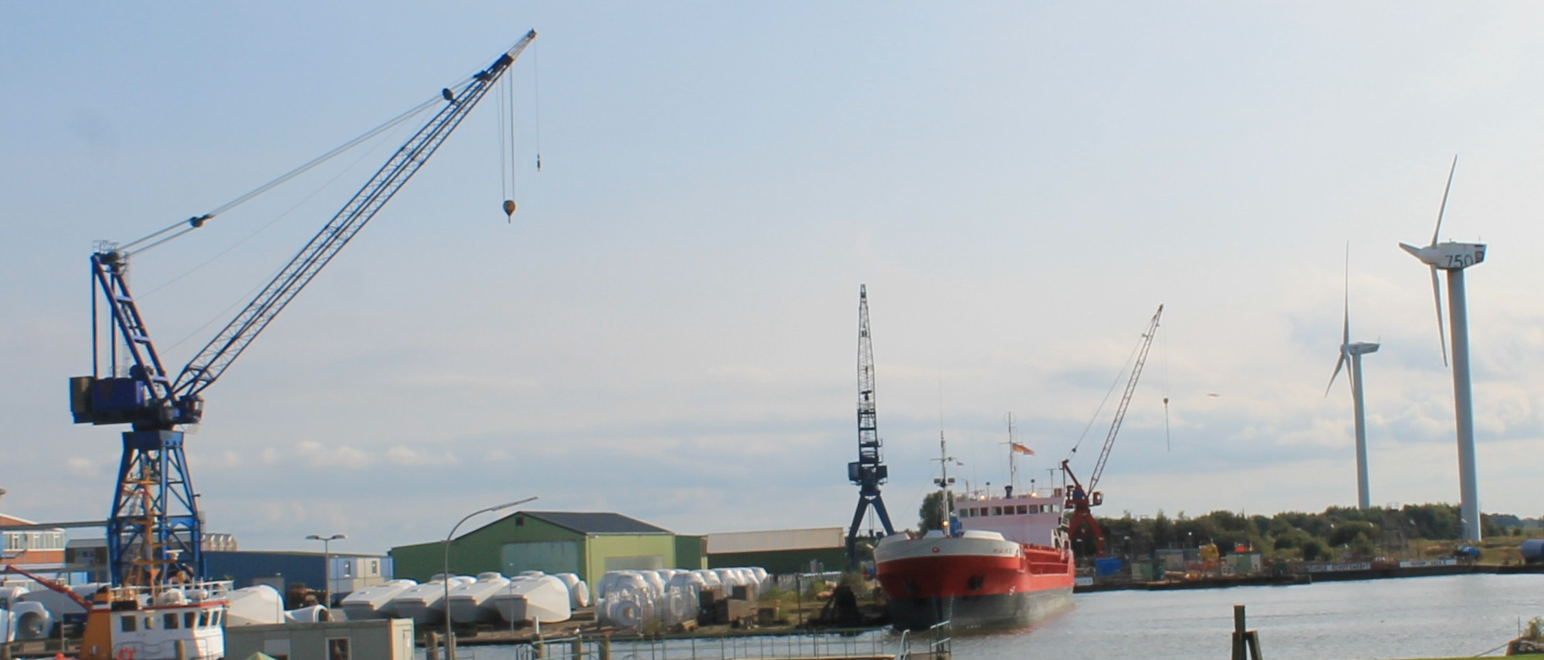 2016, Blick auf Husumer Dock und Reparatur GmbH & Co. KG, (ehemalige Husumer Schiffswerft)